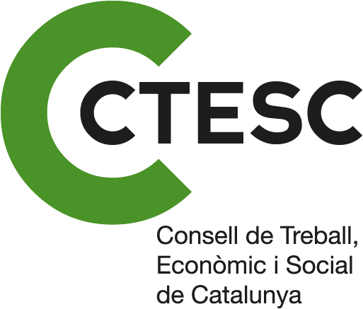 Logotip del Consell de Treball, Econòmic i Social de Catalunya